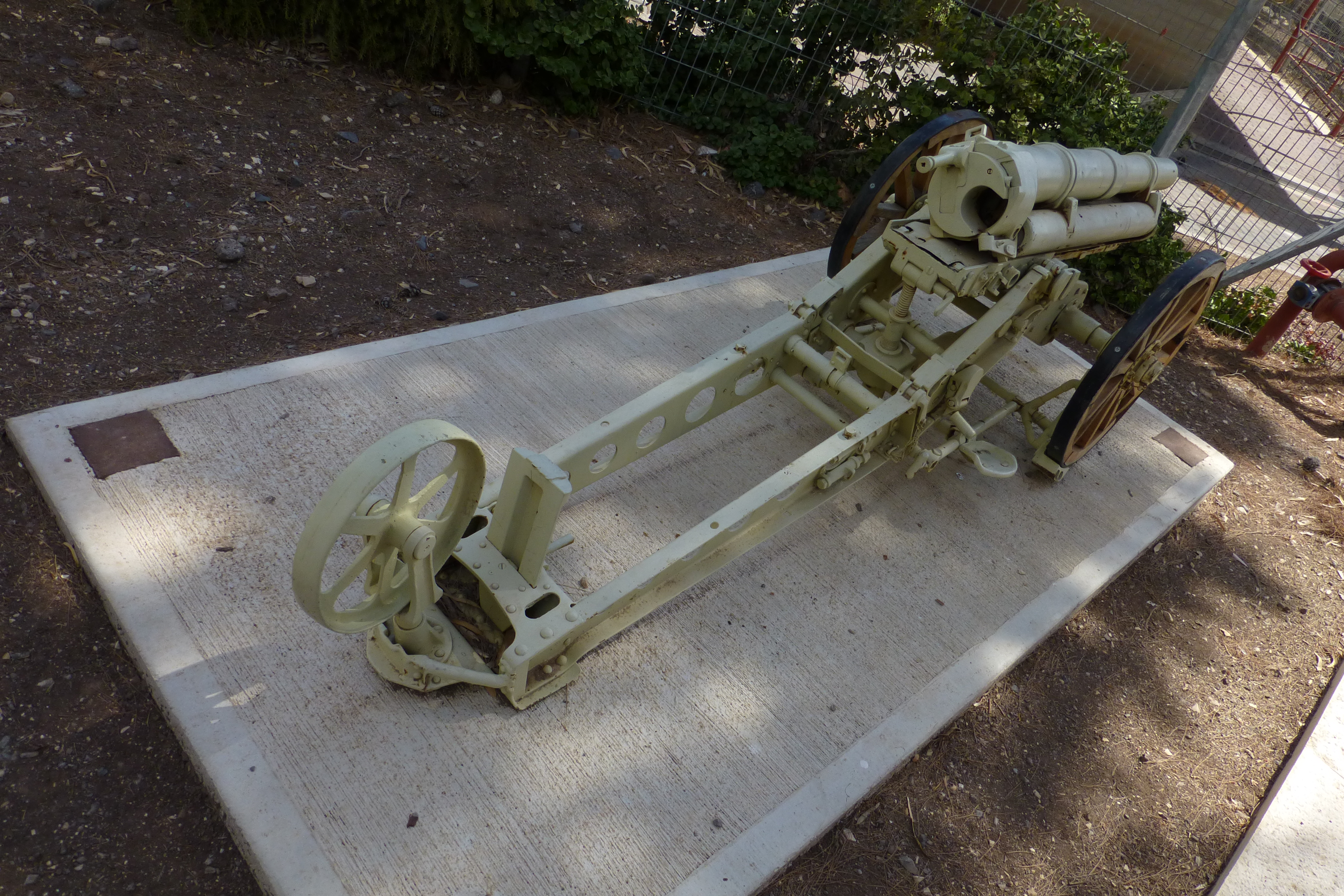 מוזיאון בית שטורמן המצוי בקיבוץ עין חרוד מאוחד נוסד בשנת 1941 על ידי חבר הקיבוץ שמואל סבוראי כמוזיאון לטבע.